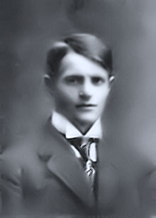 Kallis Kaarlo Wennerström